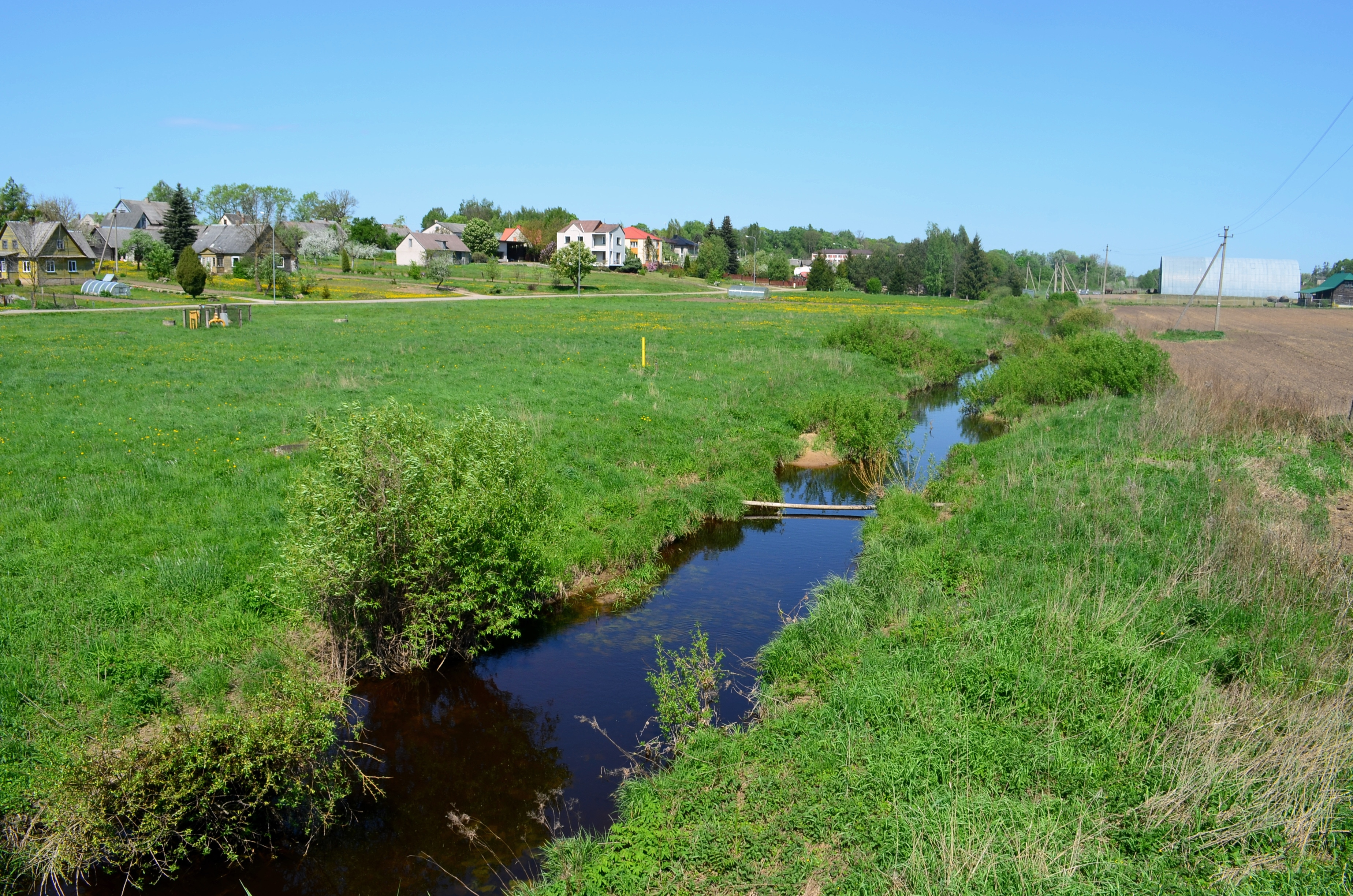 Upelis Mūšia, Taujėnai, Taujėnų sen., Ukmergės raj.